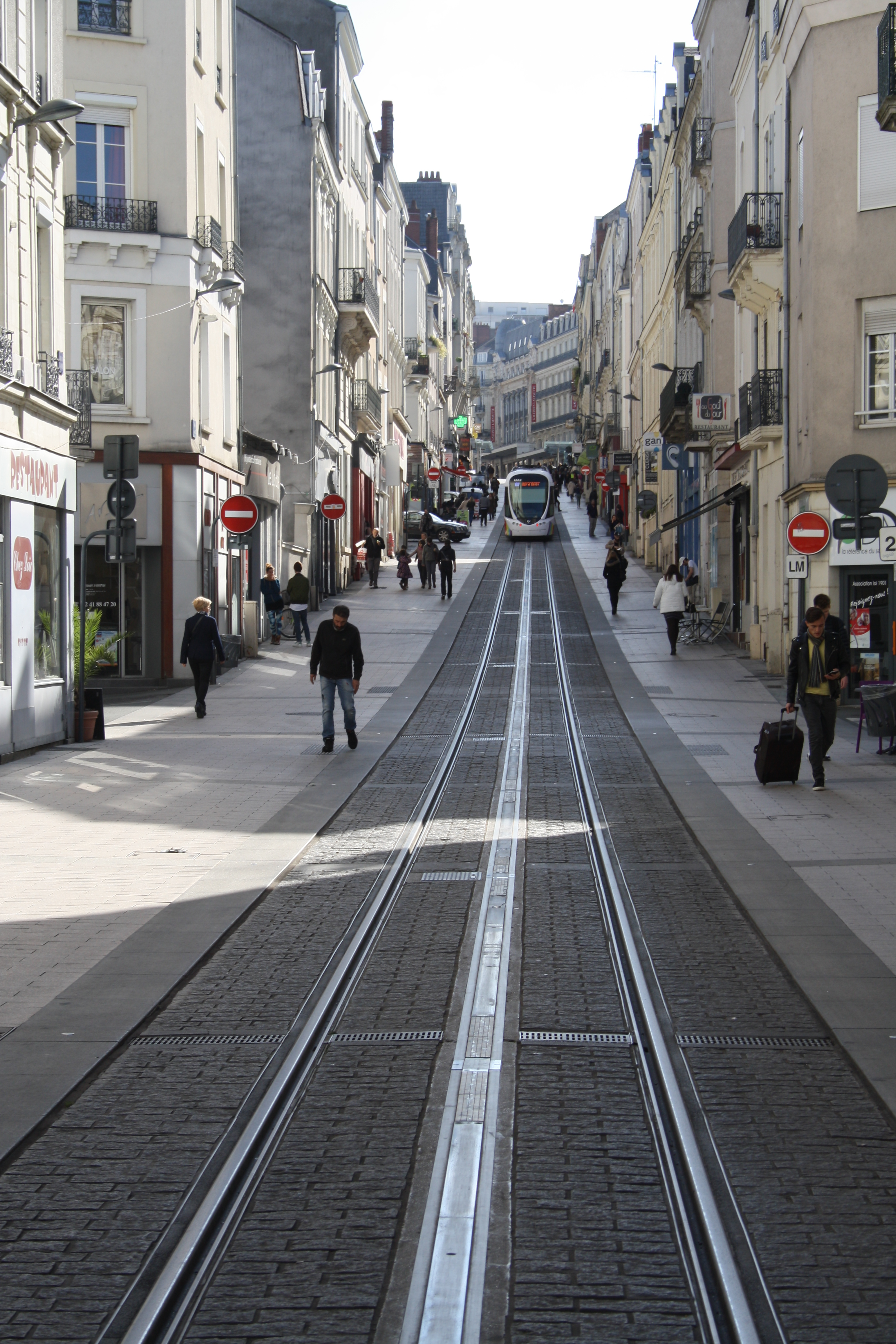 Angers, rue de la Roë